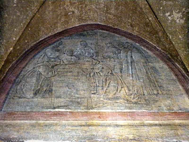 Una lunetta a verdeterra dello Squarcione nella chiesa di San Francesco Grande a Padova